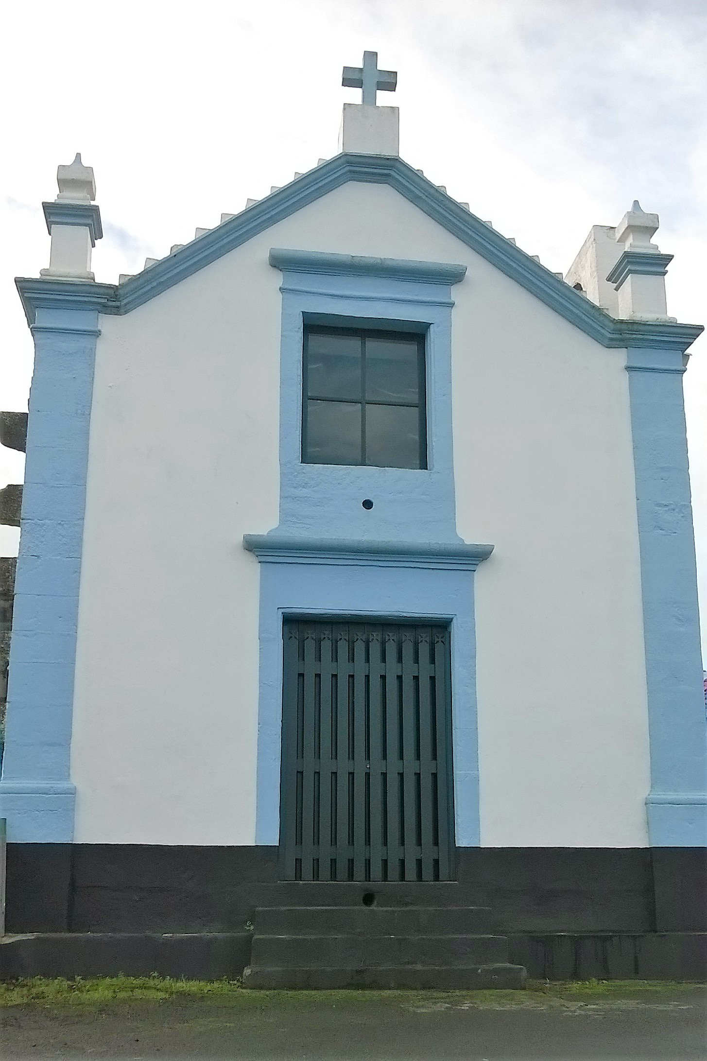 Ermida de Nossa Senhora do Loreto, freguesia dos Biscoitos, concelho da Praia da Vitória, ilha Terceira, Região Autónoma dos Açores, Portugal